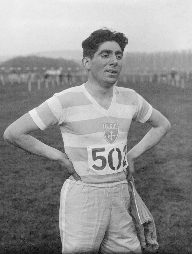 Maisons Laffitte : Cross national, Rerolle, gagnant : [photographie de presse] / Agence Meurisse